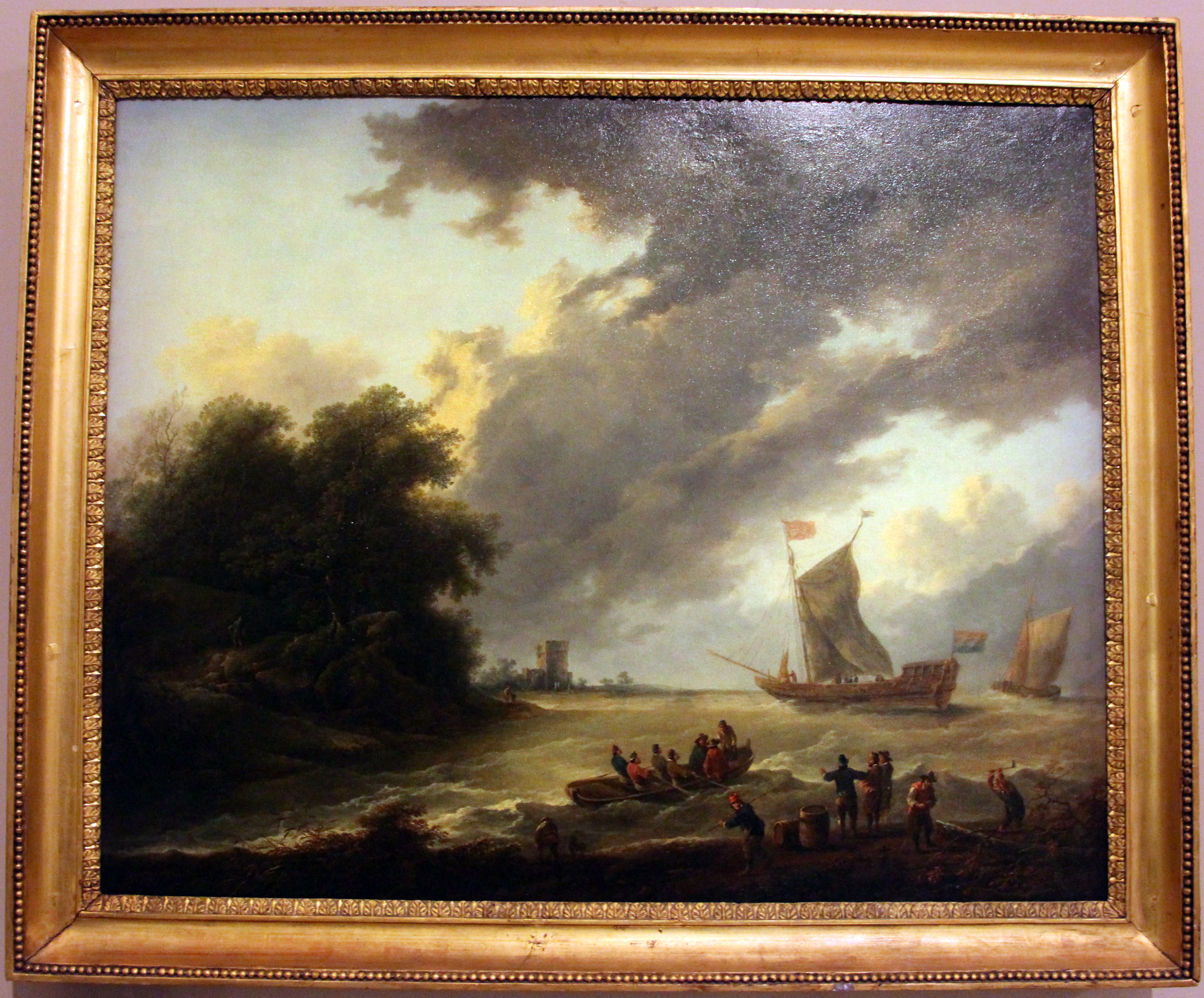 Museo Poldi Pezzoli (Milano)